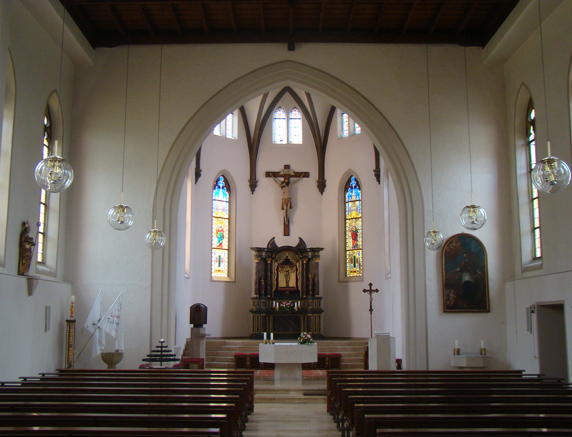 Kath. Kirche Mariä Himmelfahrt in Talheim (Lkr. Heilbronn)